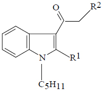 Фенилацетилиндолы